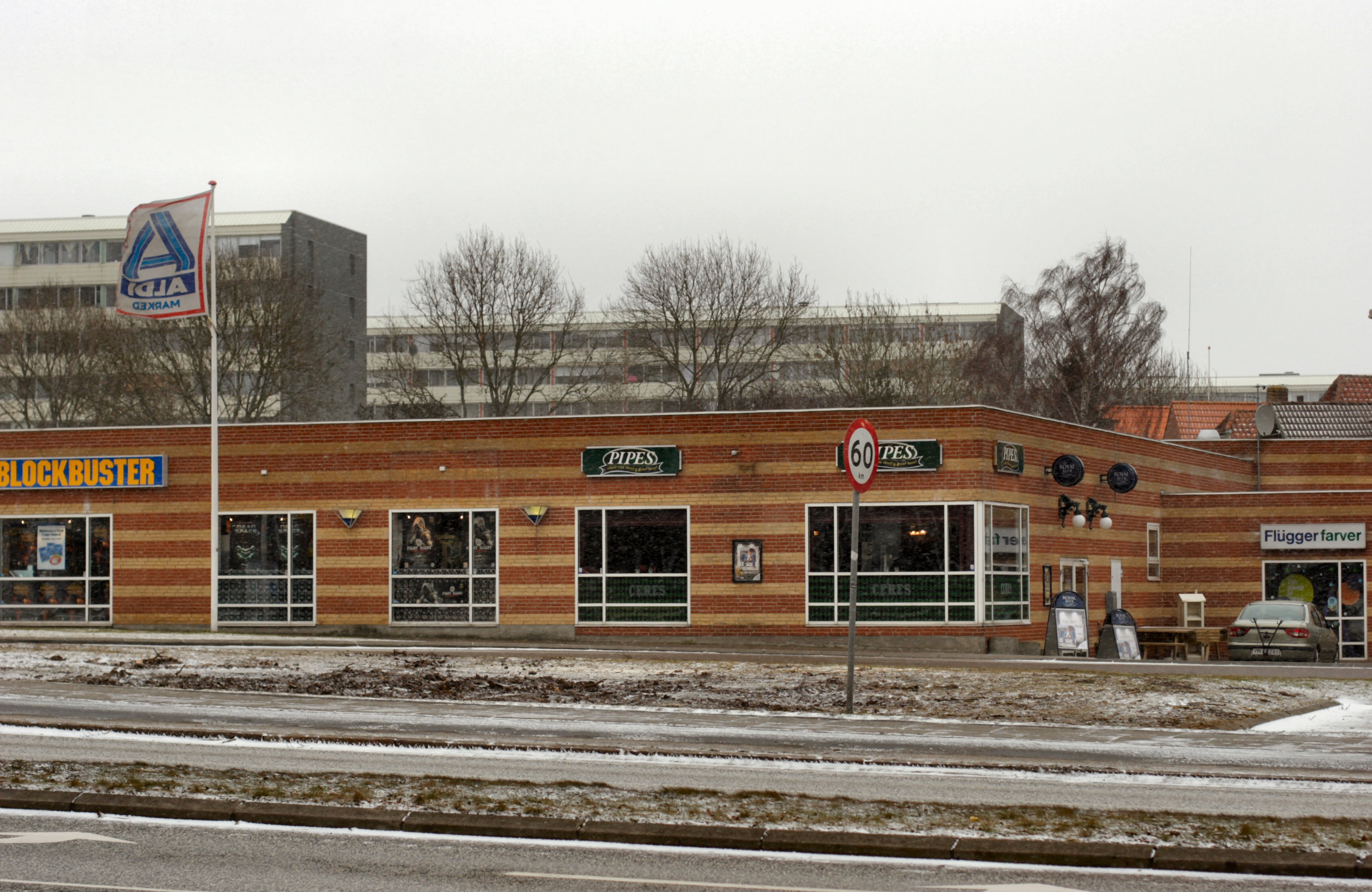 Den 13. februar 2011 blev Blodbøgen på Randersvej, Aarhus, Danmark fældet, den stod tidligere her.